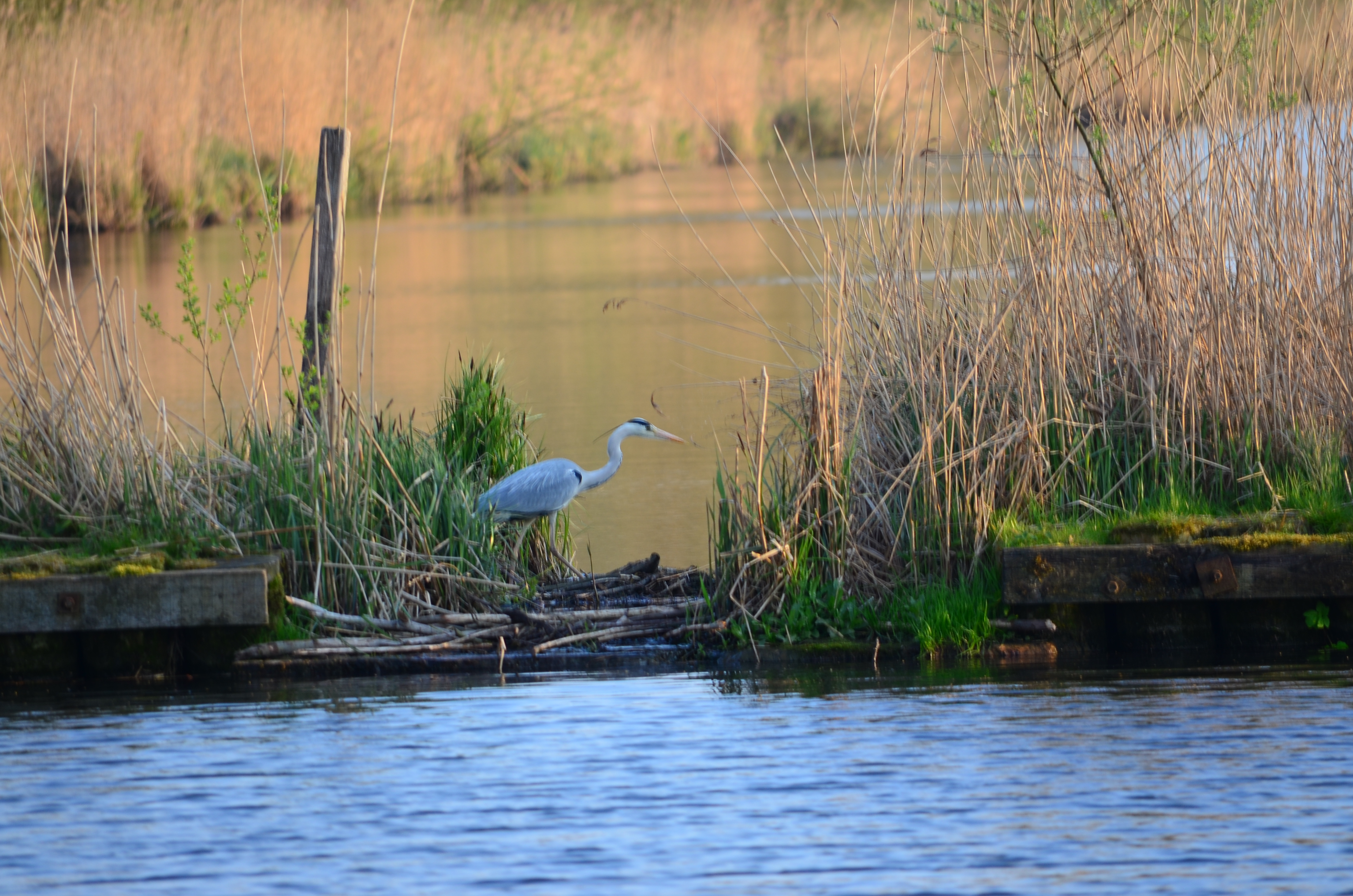 Graureiher (Ardea cinerea) im Naturschutzgebiet „Peenetal von Jarmen bis Anklam“ (N328), Landkreis Vorpommern-Greifswald bei Anklam